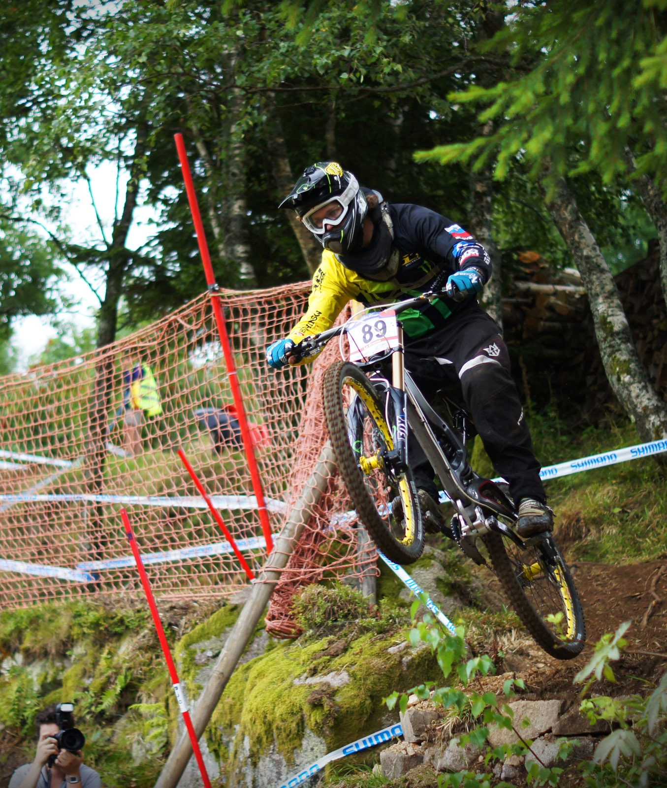 Coupe du monde de descente à la Bresse en 2011.